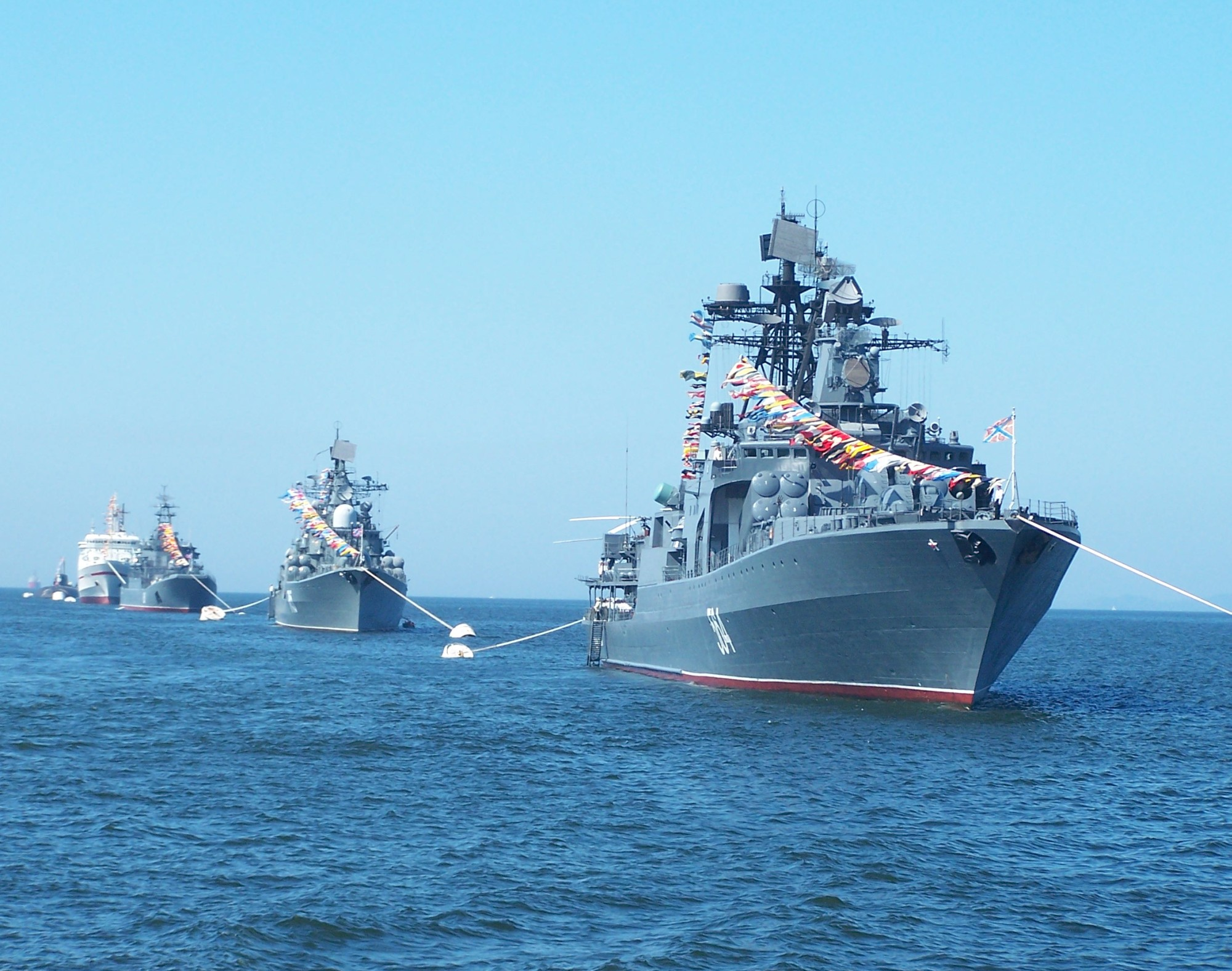 Корабли ТОФ в кильватерном строе в день празднования дня Военно-Морского Флота. Владивосток